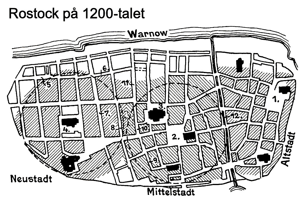 Rostock im 11. Jahrhundert